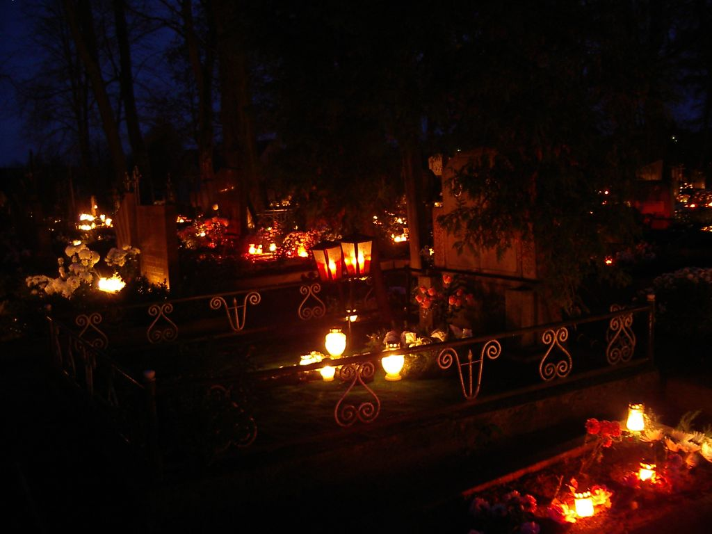 Per vėlines ant kapų degamos žvakutės